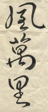 Numérisation d'un brouillon préparatoire à une calligraphie de la calligraphe Iris Yawen Hsu, appartenant à Vincent Ramos et publié pour Wikipédia sous licence GFDL. Vincent Ramos